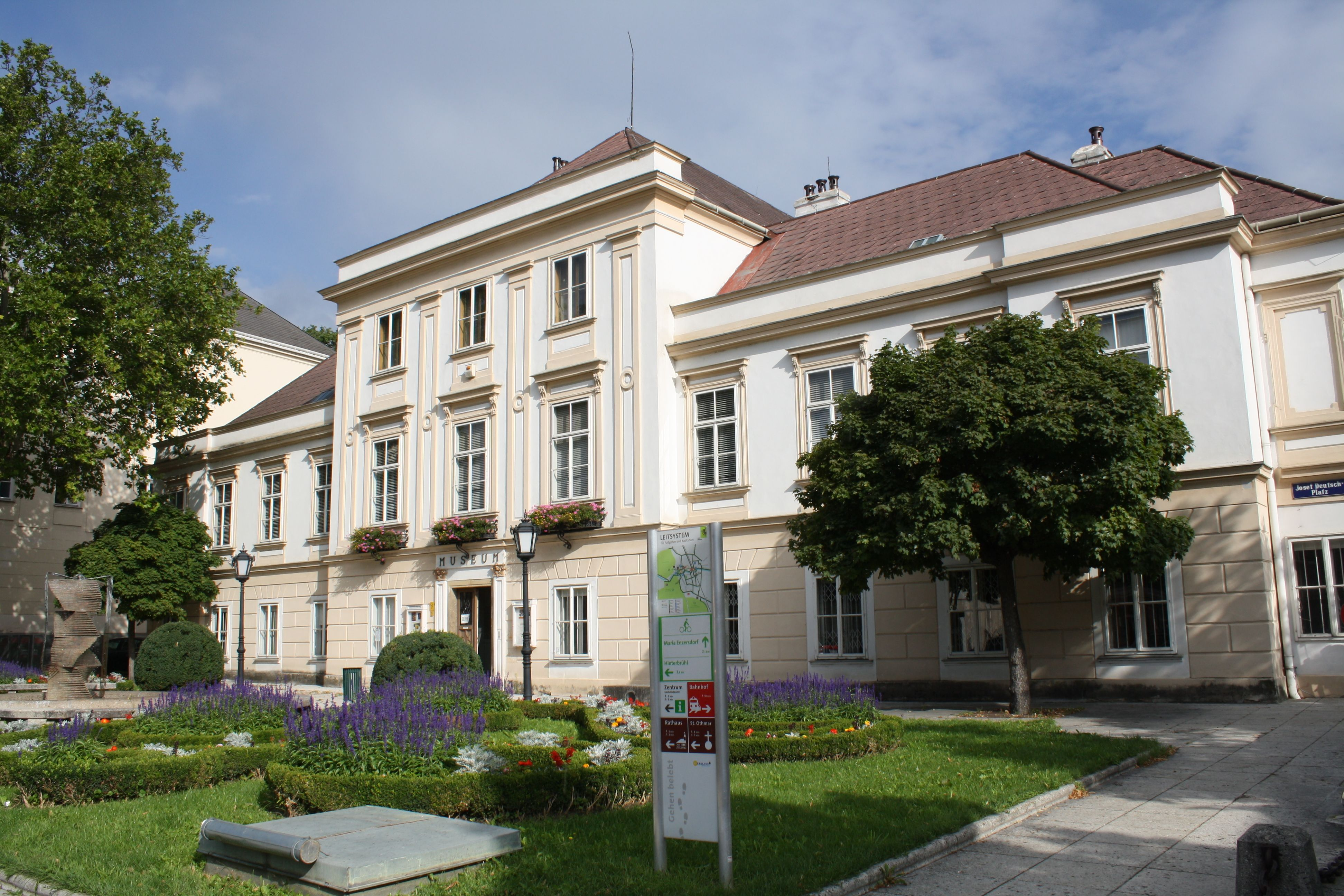 Museum in Mödling